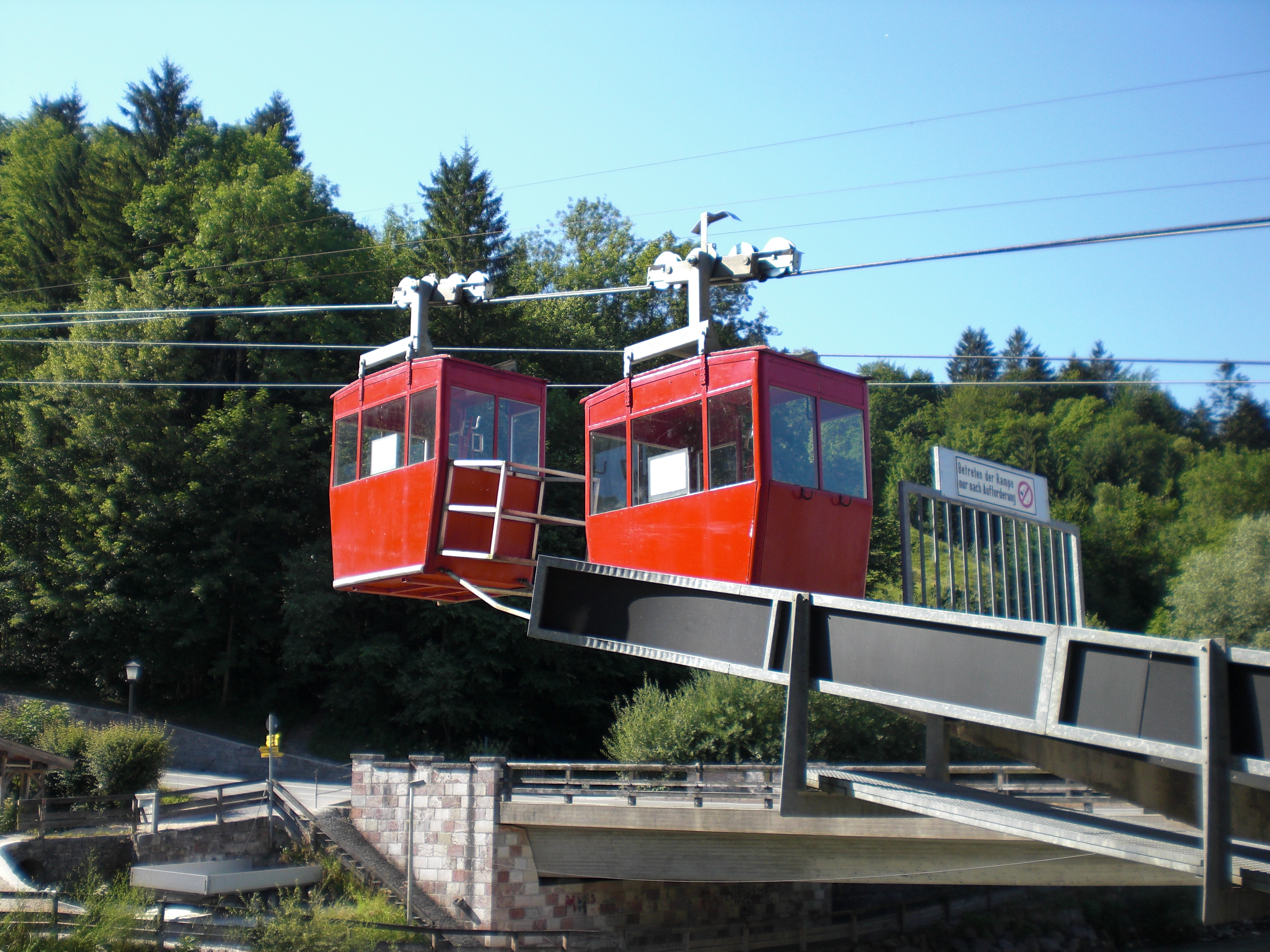 Obersalzbergbahn- Gondeln an der Talstation in Berchtesgaden